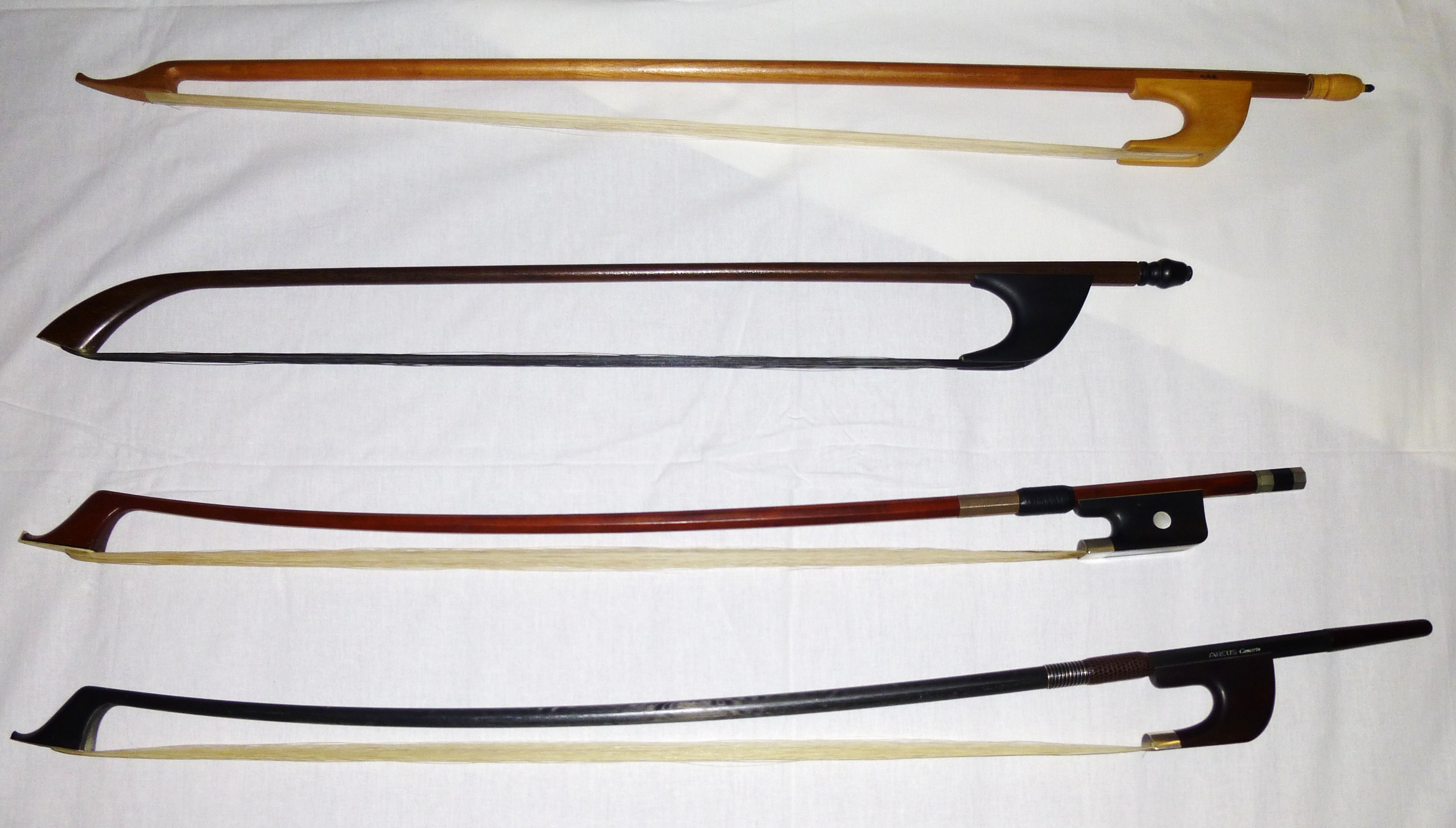 historische und moderne Bauformen des Kontrabassbogens. Von oben nach unten: Violone-Bogen, moderner Nachbau eines Modells aus der Zeit um 1750 (André Alègre) -- moderner Nachbau eines Bogens im Stil von Domenico Dragonetti um 1830 (André Alègre) -- moderner Kontrabassbogen in französischer Bauweise -- moderner Kontrabassbogen in deutscher Bauweise